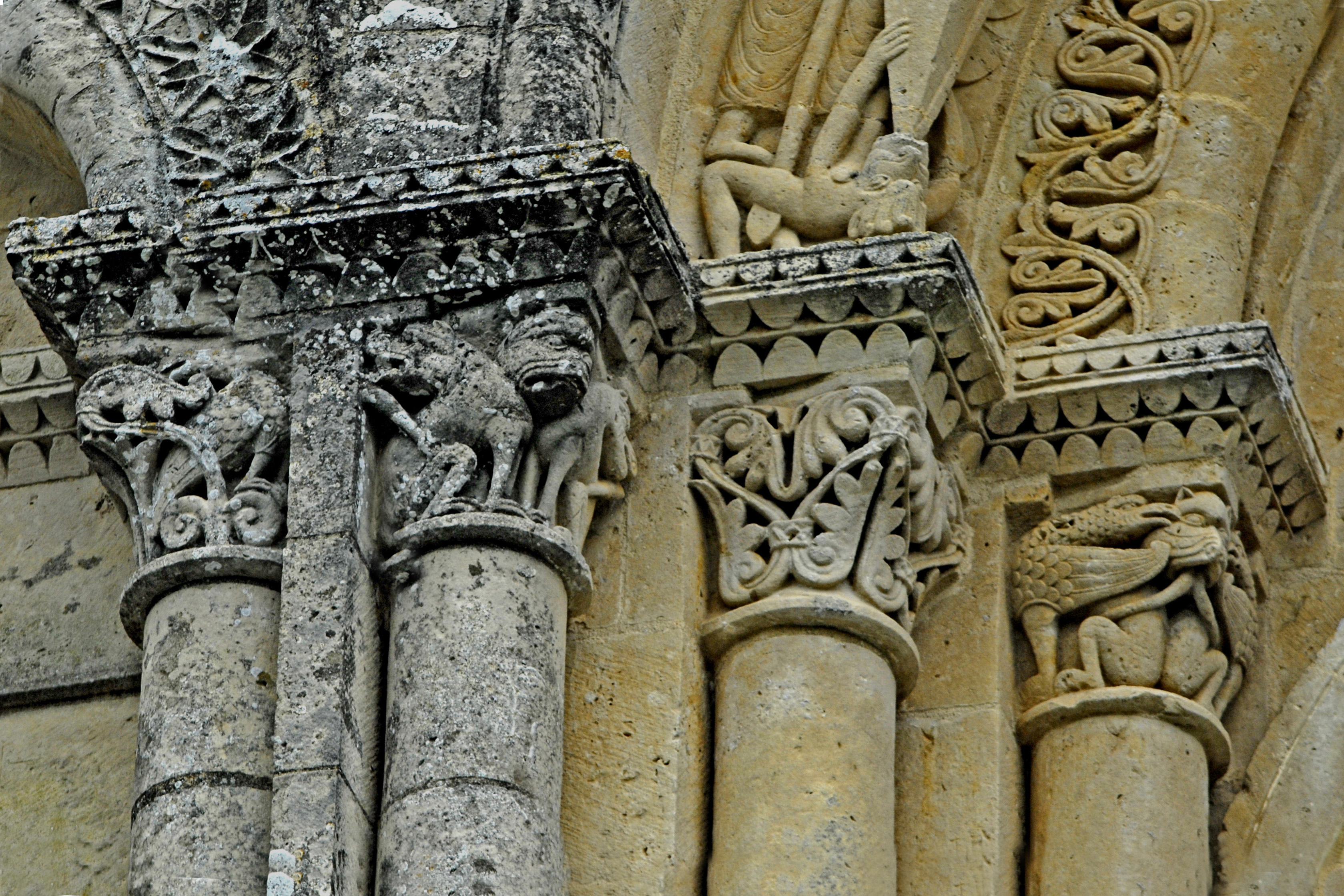 St.-Pierre Aulnay, Kapitelle, Fenster über Südportal